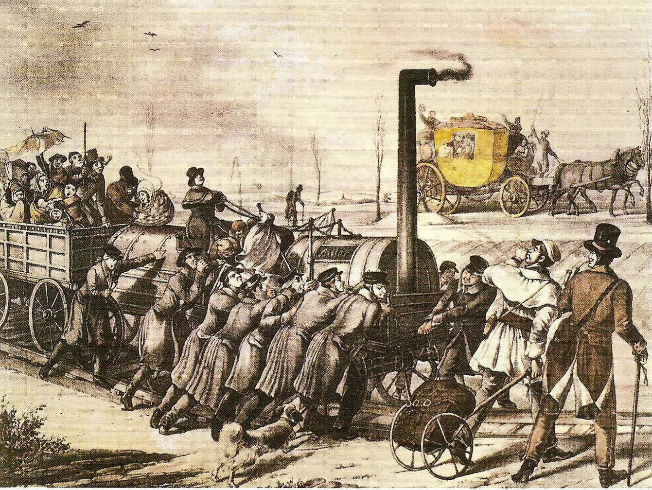 Spottbild auf die Eisenbahn